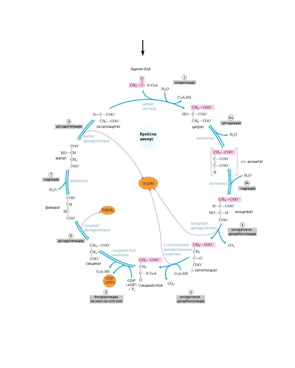 Krebs cycle. Кребсов циклус.